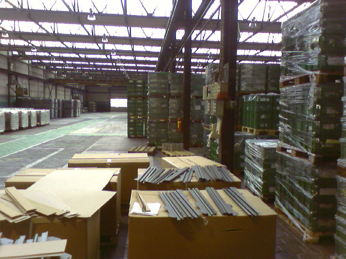 Alcoa Nederland - Drunen